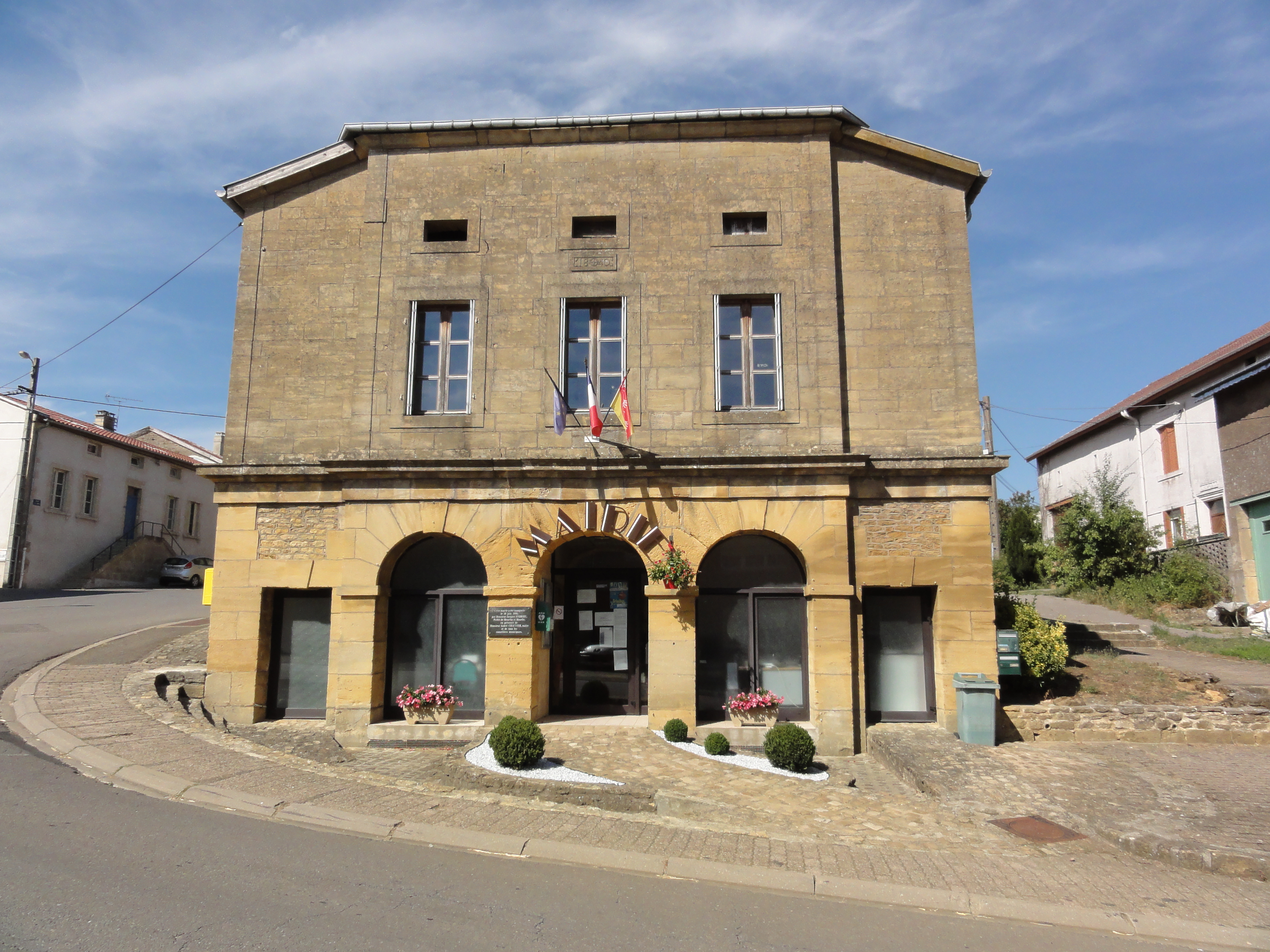 Fresnois-la-Montagne (Meurthe-et-M.) mairie